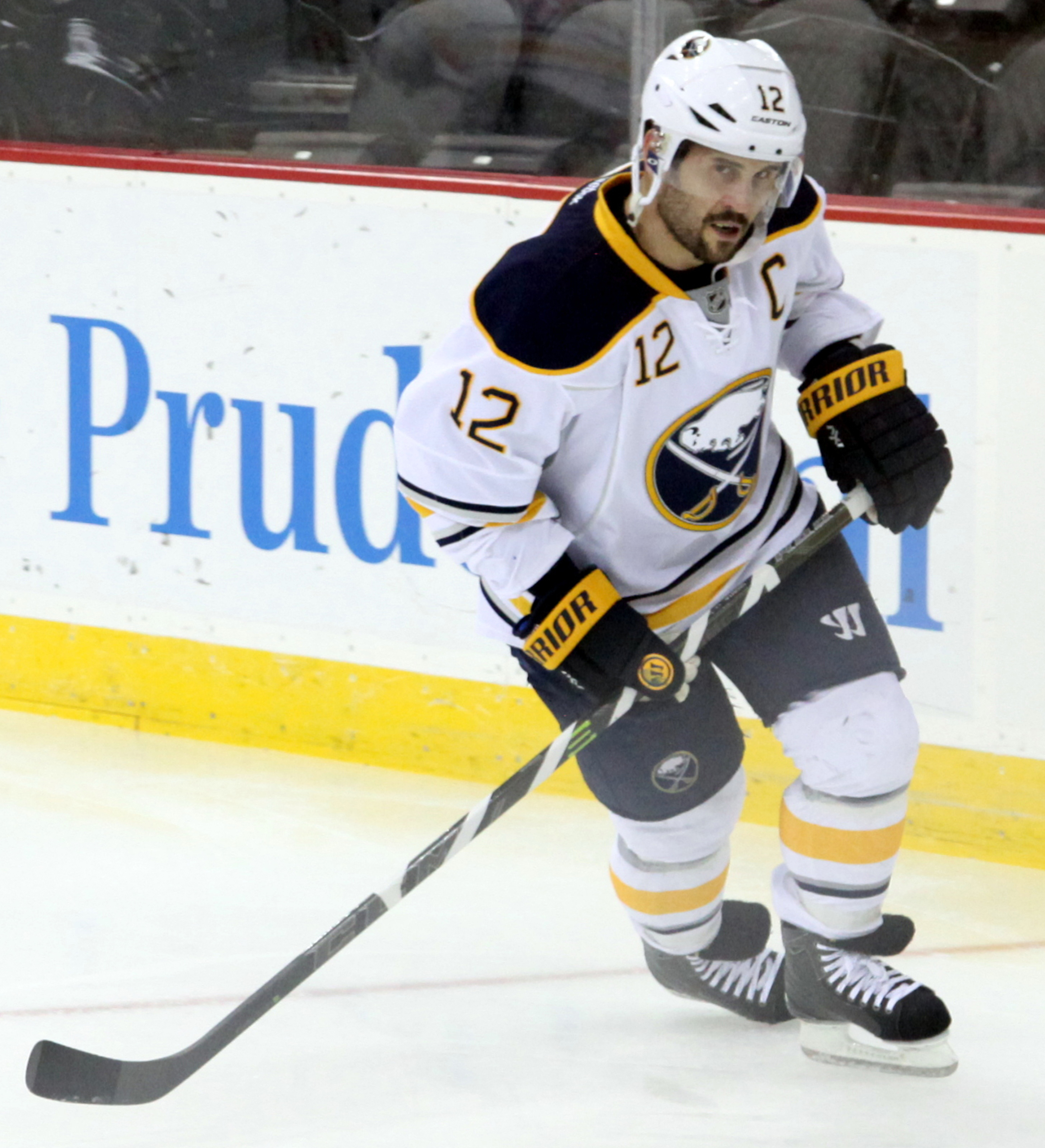 Gionta in April 2016.